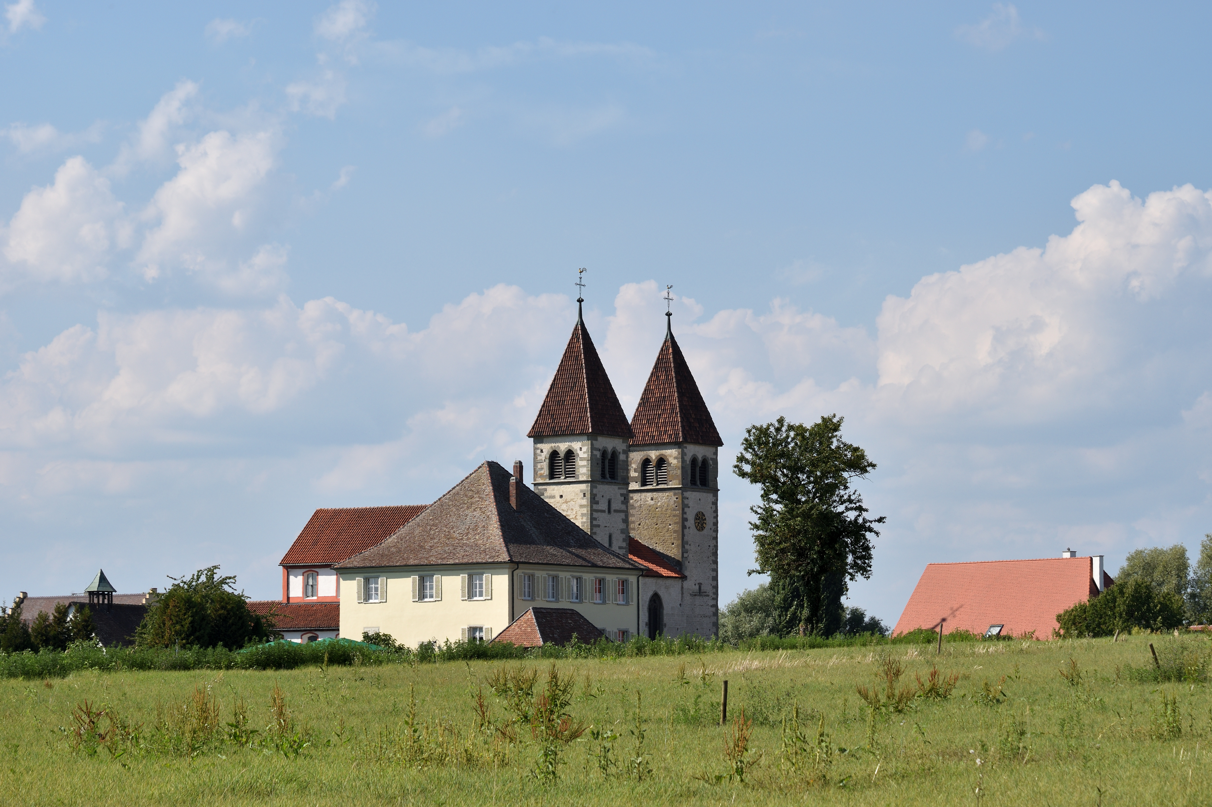 Insel Reichenau - St. Peter und Paul - August 2018